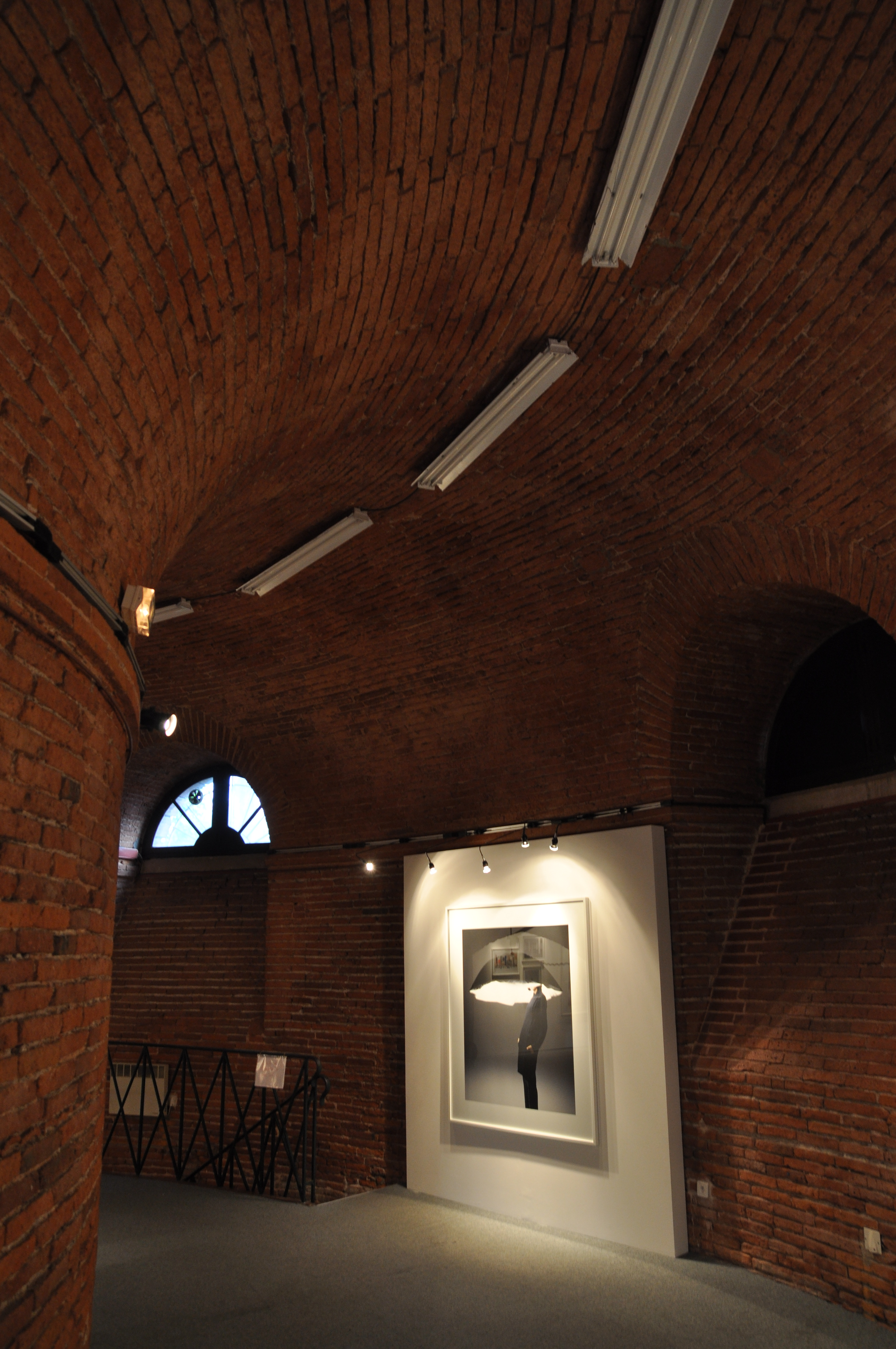 Château d'eau Laganne JEP 2013 .